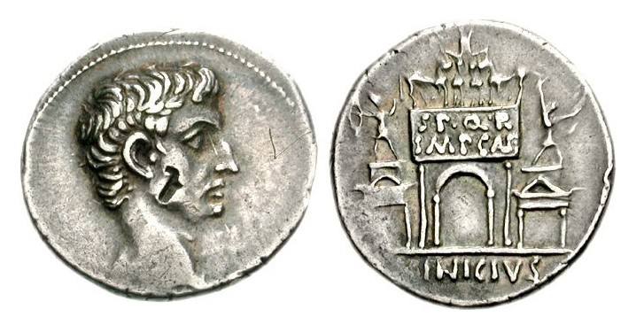 Augustus. 27 BC-AD 14. AR Denarius (3.80 g, 10h). Rome mint. L. Vinicius, moneyer. Struck 16 BC.Bare head right / [L •] VINICIVS in exergue, triumphal arch, surmounted by facing quadriga, in which Augustus stands, holding laurel branch in right hand and scepter in left; smaller arch on either side, surmounted by archer on left and by slinger on right; S • P • Q • R/IMP CAE in two lines on entablature of arch.RIC I 359; RSC 544; BMCRE 77-8 = BMCRR Rome 4477-8; BN 348-51.